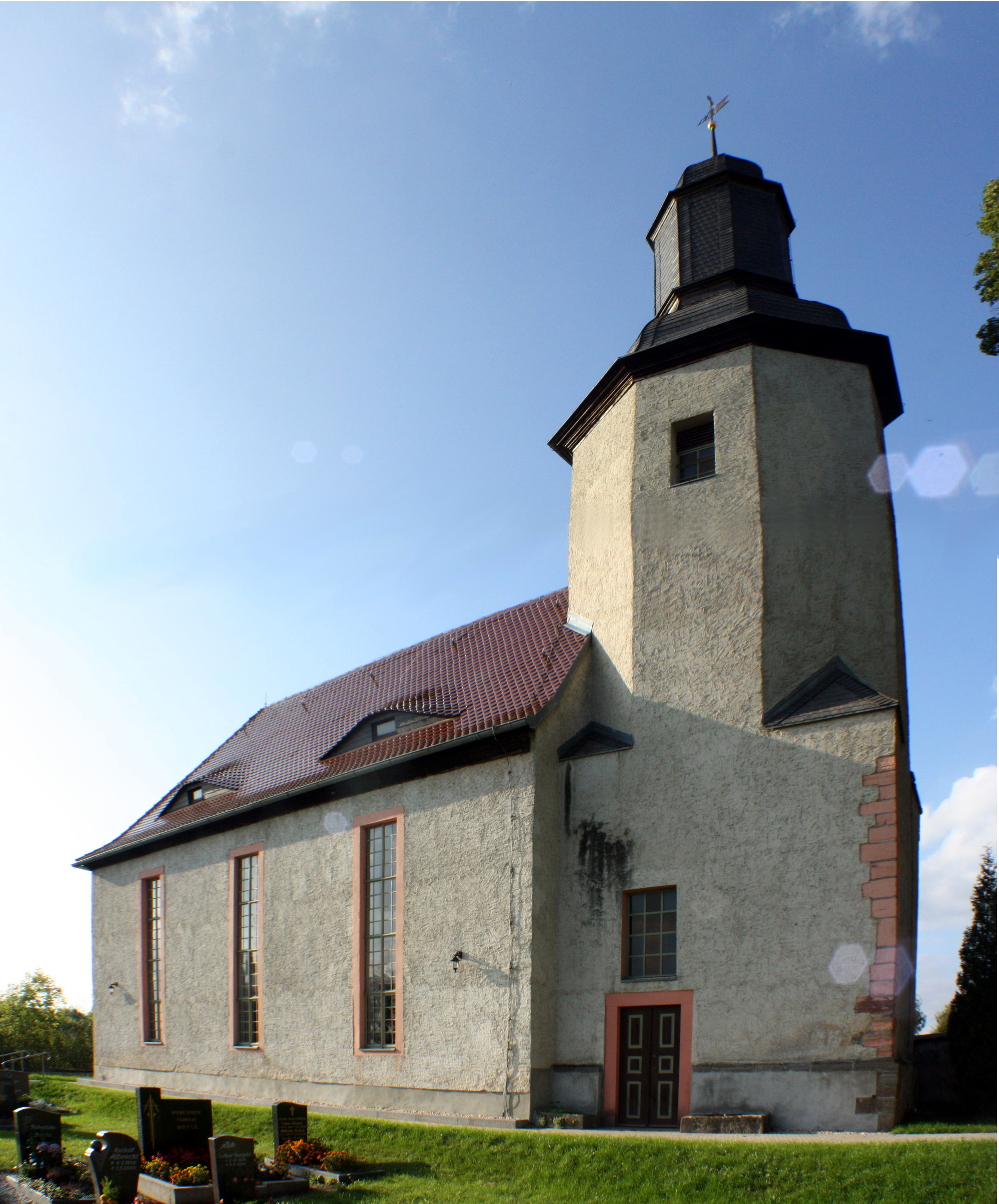 Kirche im ostthüringischen Schwaara bei Gera